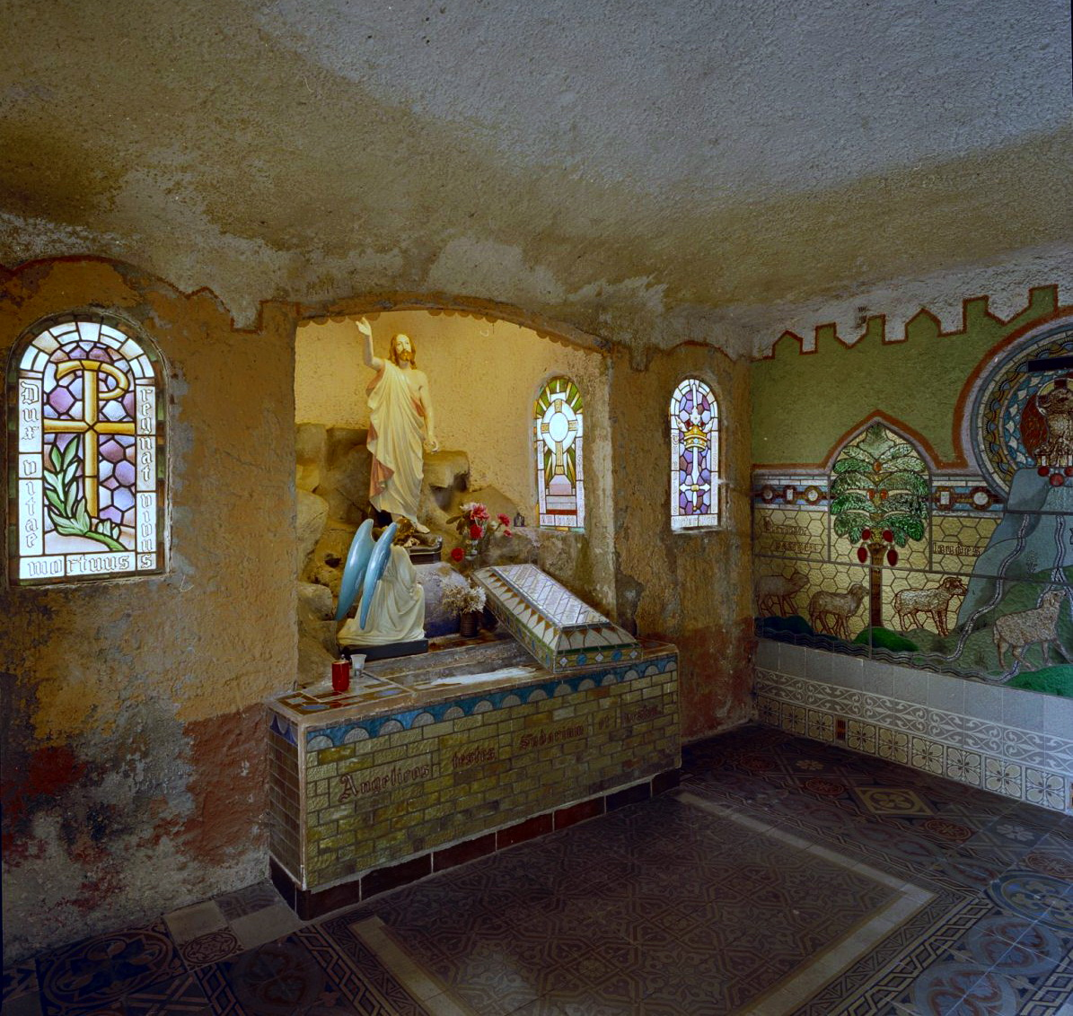 Kloostertuin Missiehuis Sint-Michael: Interieur Verrijzeniskapel.